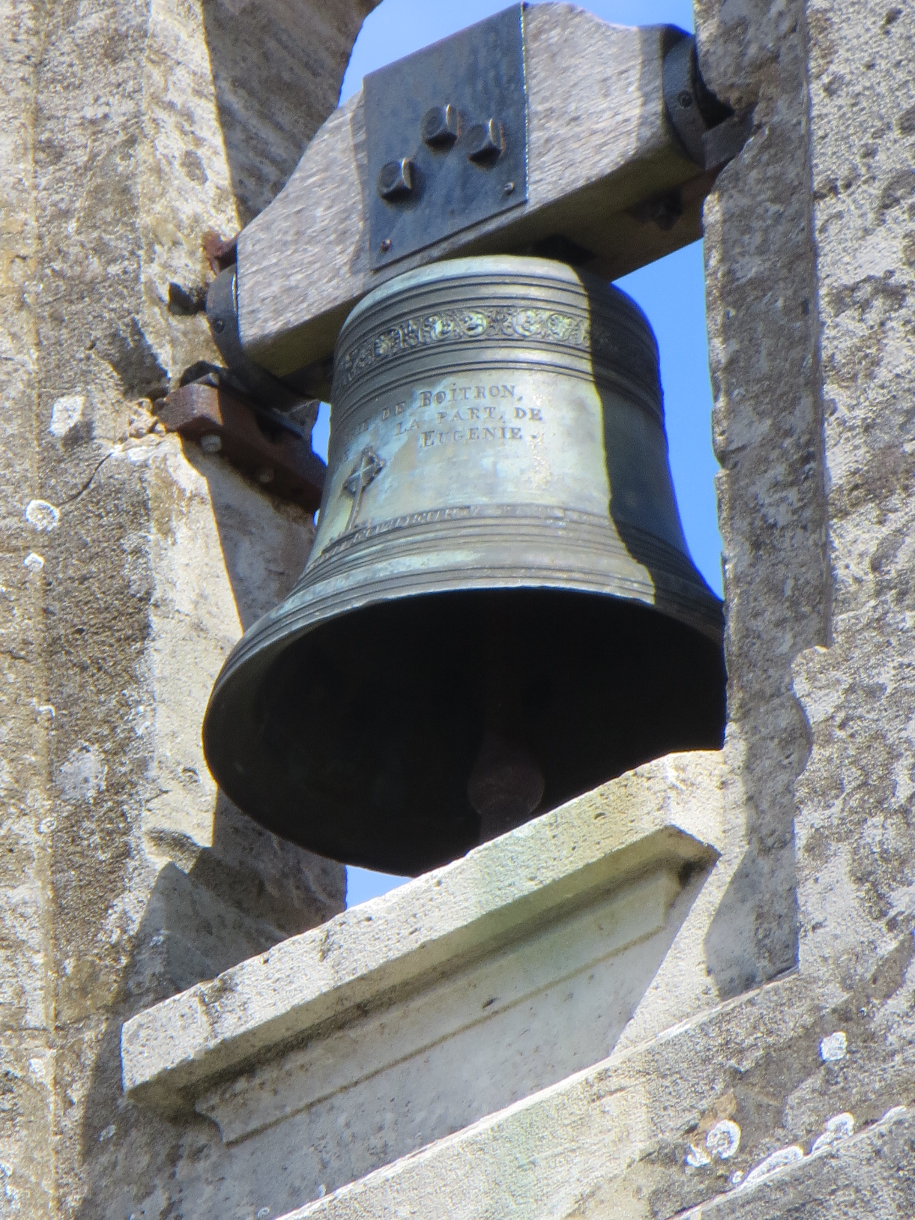 Cloche de la mairie. On lit les mots « (Mai)rie de Boitron (de?) la part de (...) Eugénie